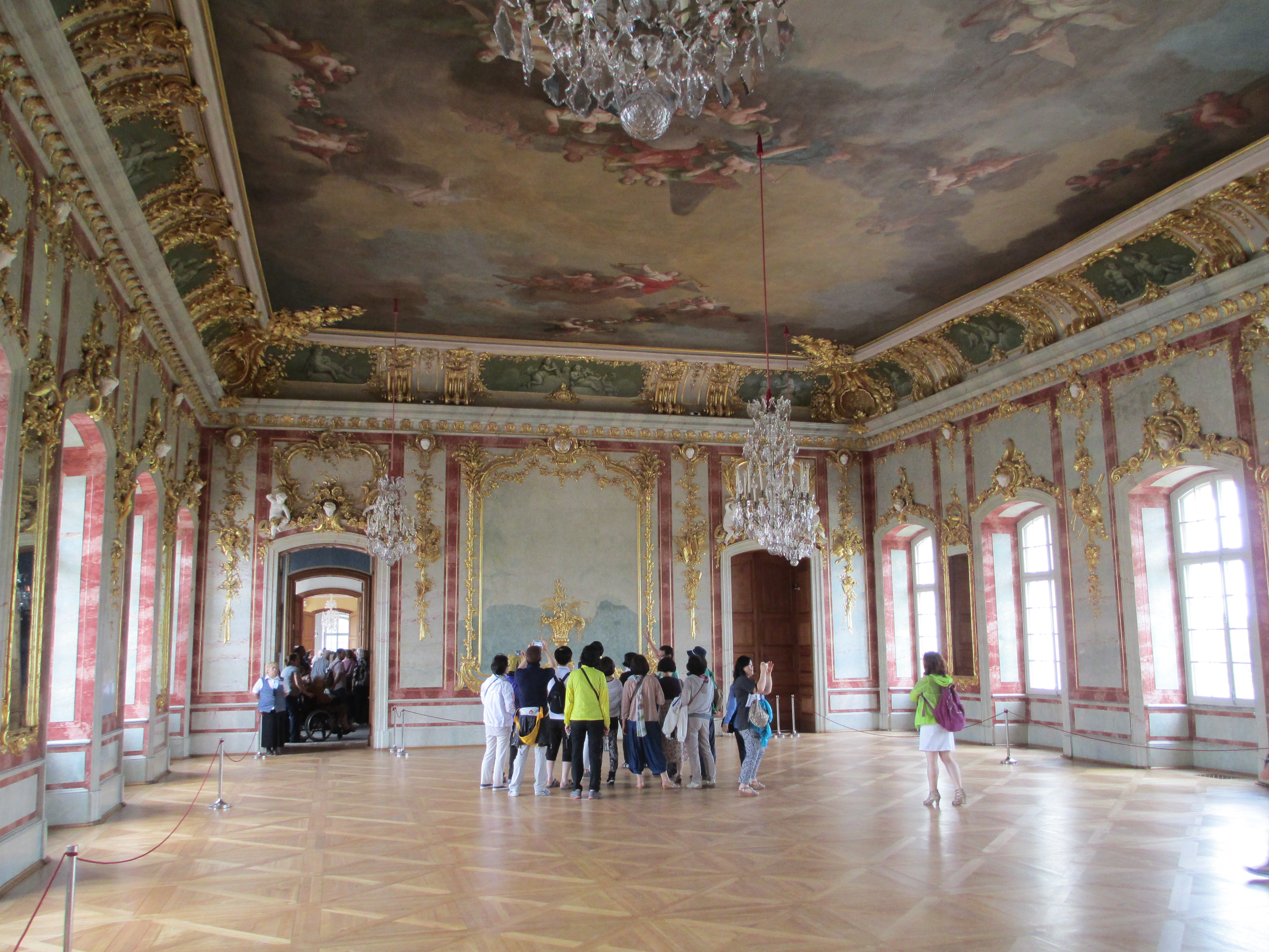 אולם קבלות הפנים בארמון רונדלה